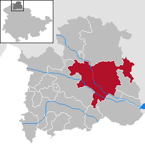 Kreisstadt Nordhausen in Thüringen, Landkreis Nordhausen